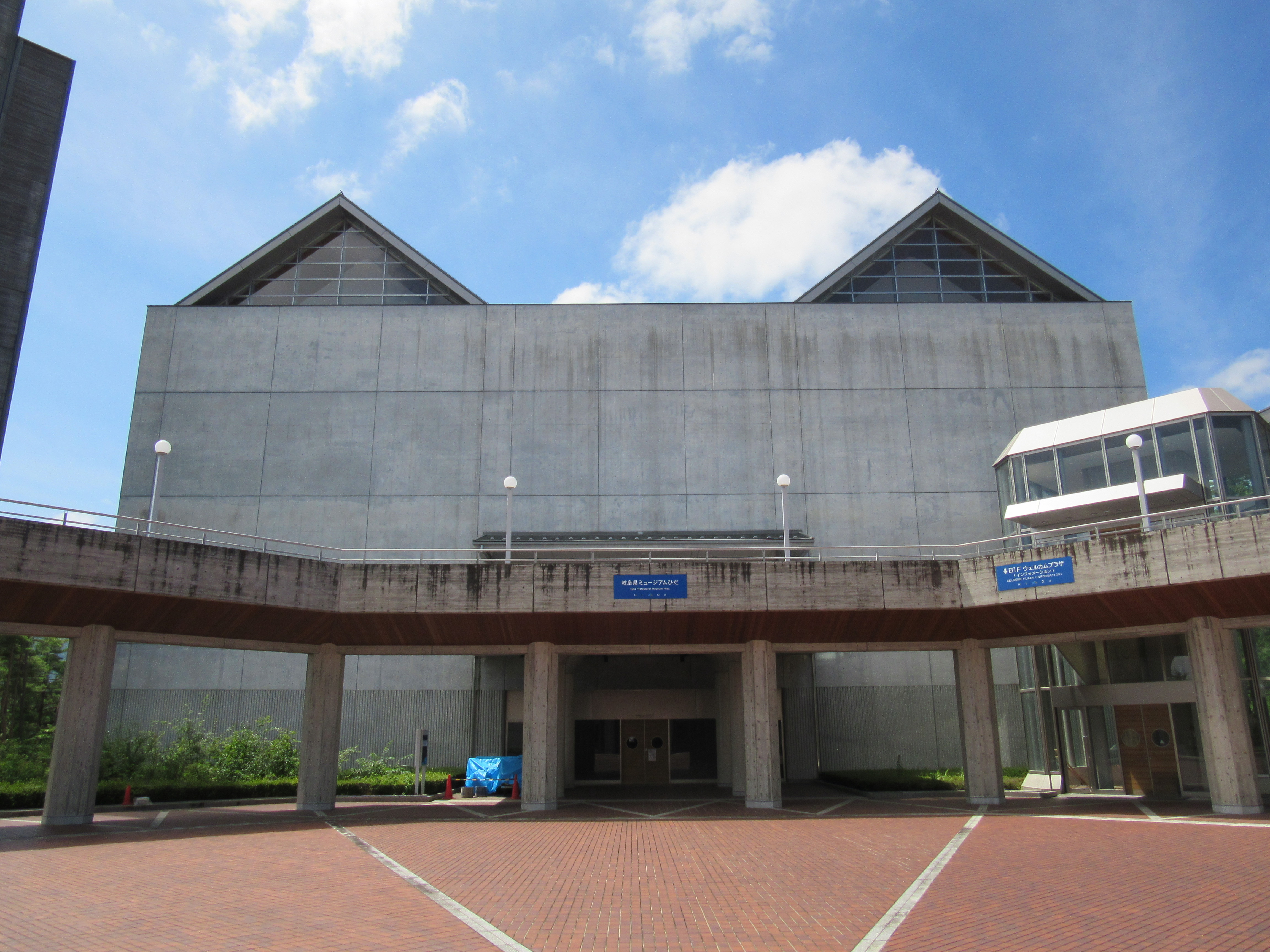 ミュージアム飛騨